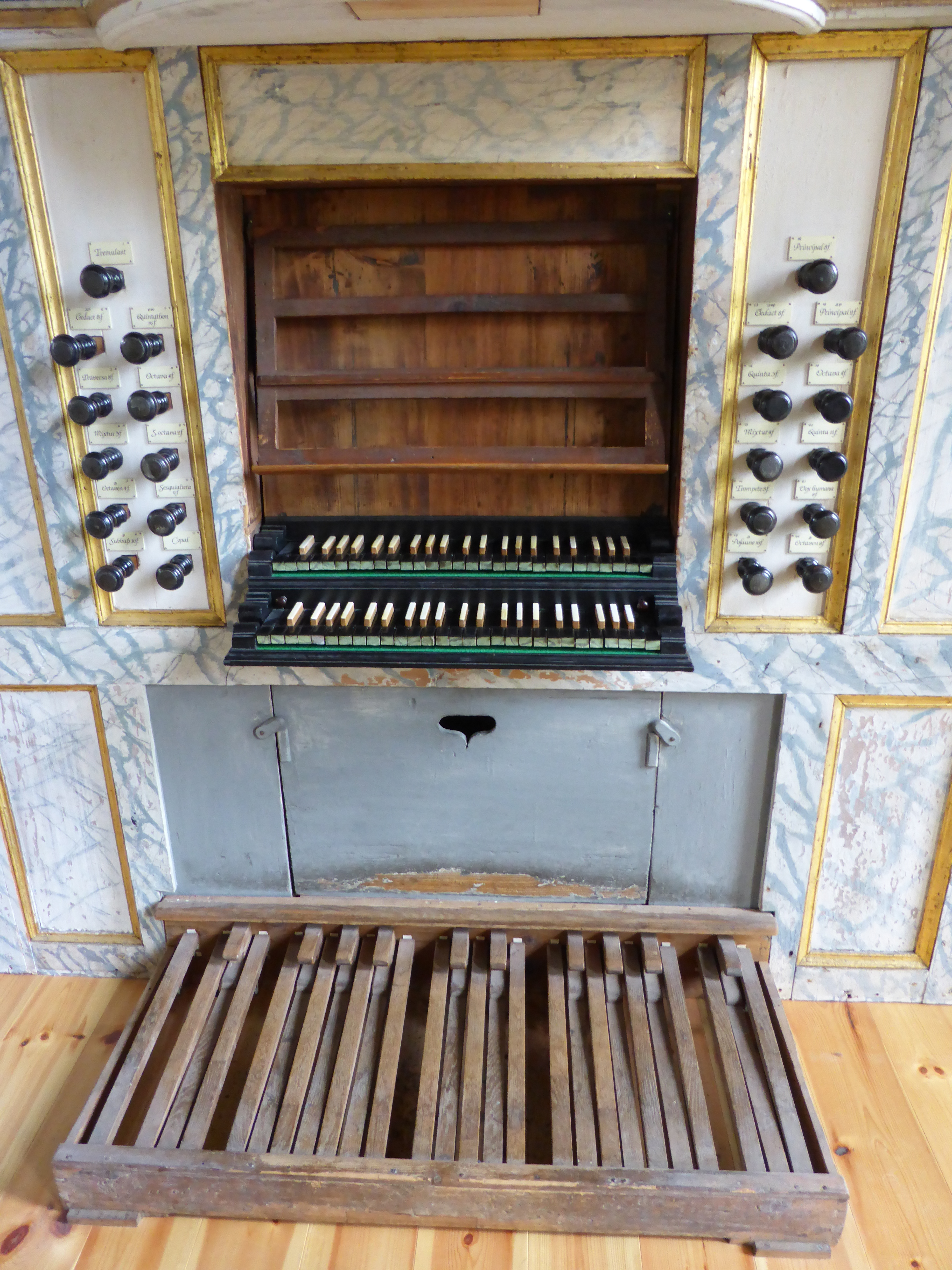 Johann Adolarius Papenius (* 1696/97; † 10. Januar 1779) 1747 Hordorf (Sachsen-Anhalt), jetzt St. Marien (Bad Belzig)